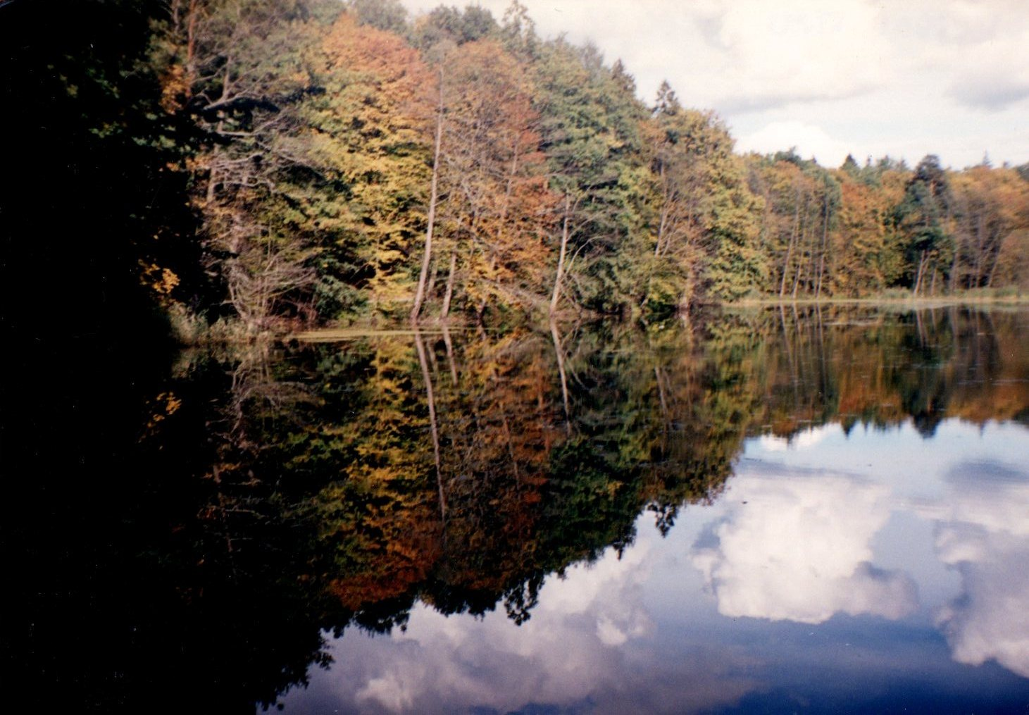 Autor: Adrian Grzegorz Rok wykonania: 2002